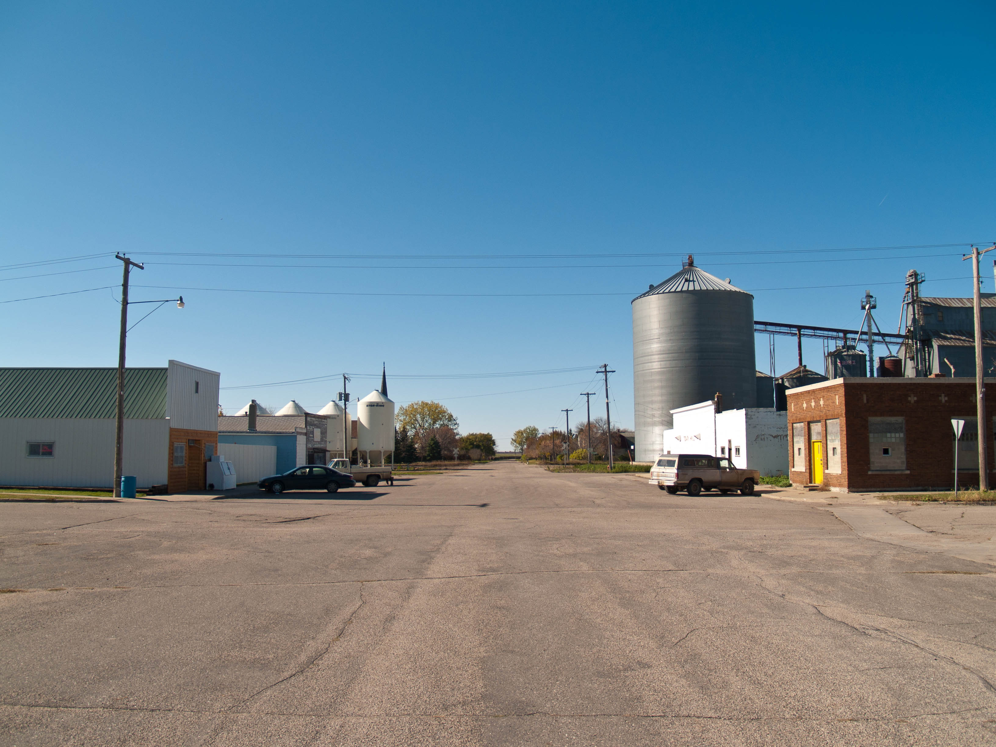 Oberon, North Dakota